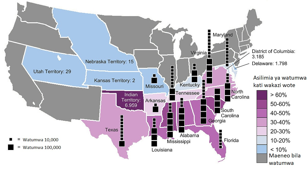 Kiswahili: Ramani inaonyesha majimbo ya Marekani mnamo mwaka 1860, kabla ya vita ya wenyewe kwa wenyewe. Rangi zinadokeza asilimia ya watumwa kati ya wakazi wote kijimbo